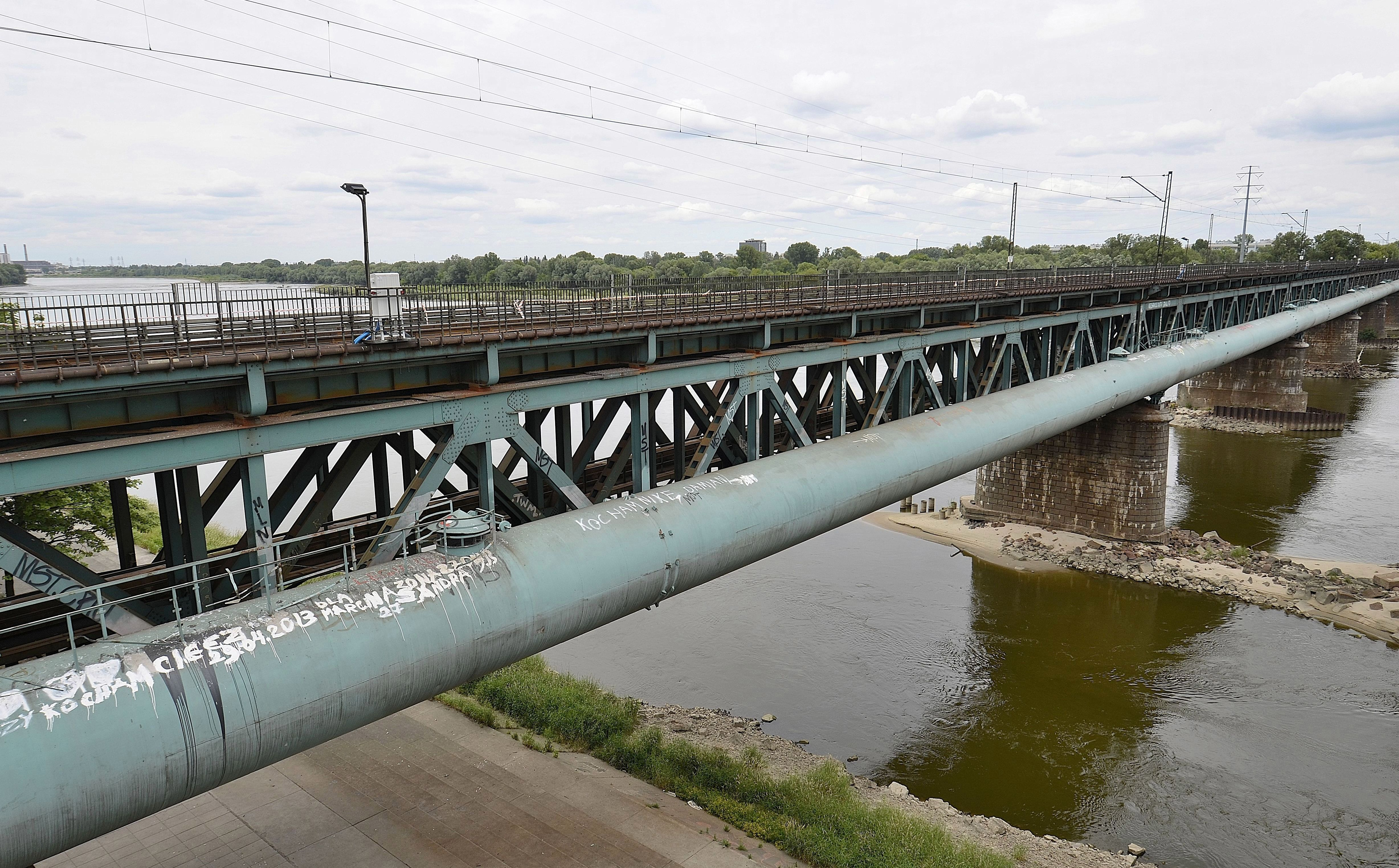 Most kolejowy pod Cytadelą w Warszawie